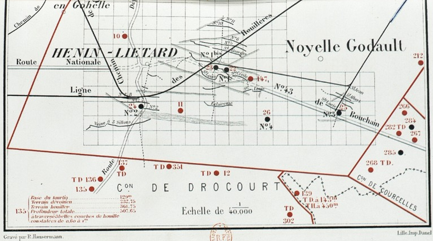 Compagnie des mines de Dourges.